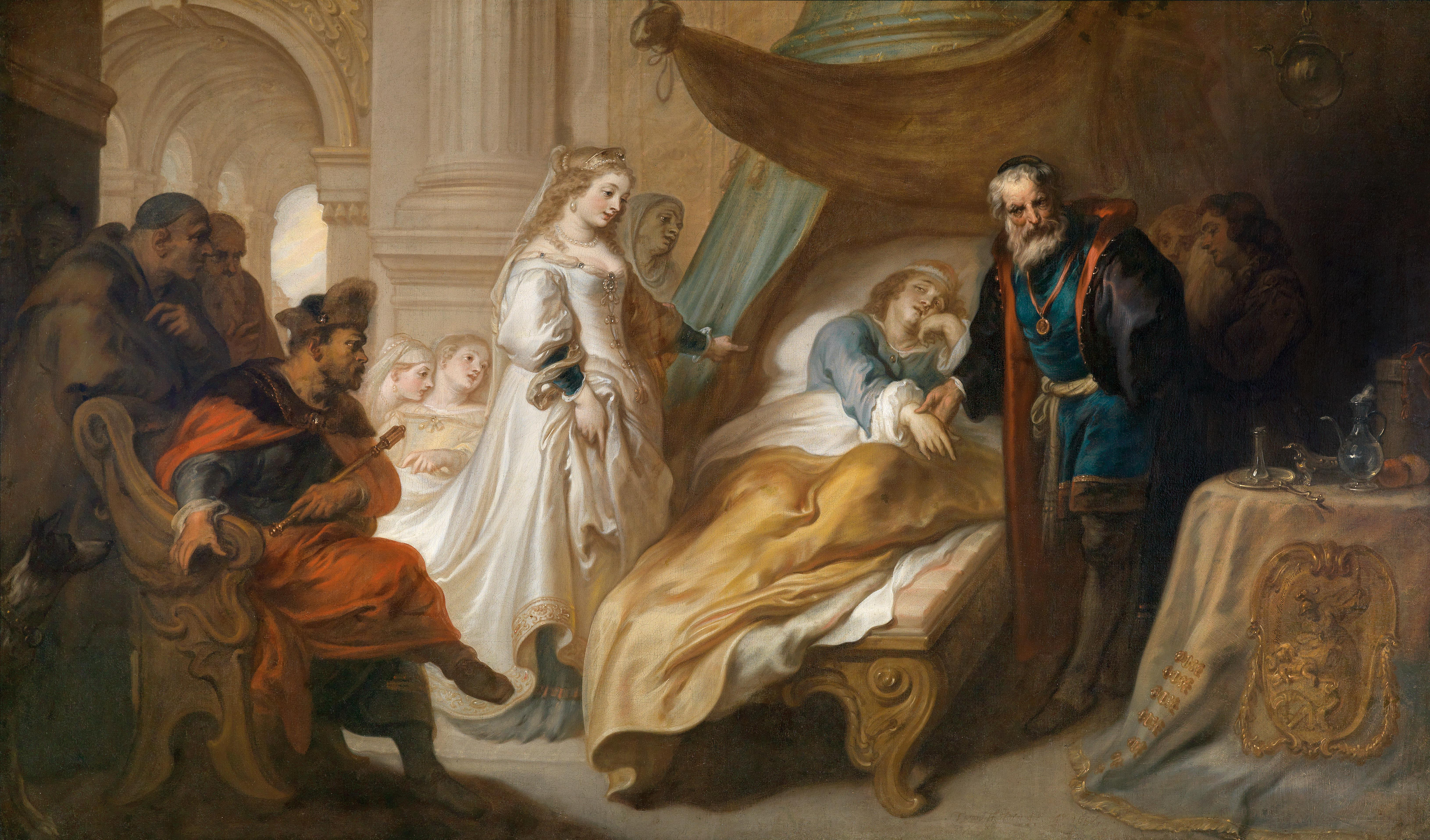 Antiochus und Stratonike, beschriftet auf dem Emblem des Tischtuchs unten rechts: Prudentia relevant amorem